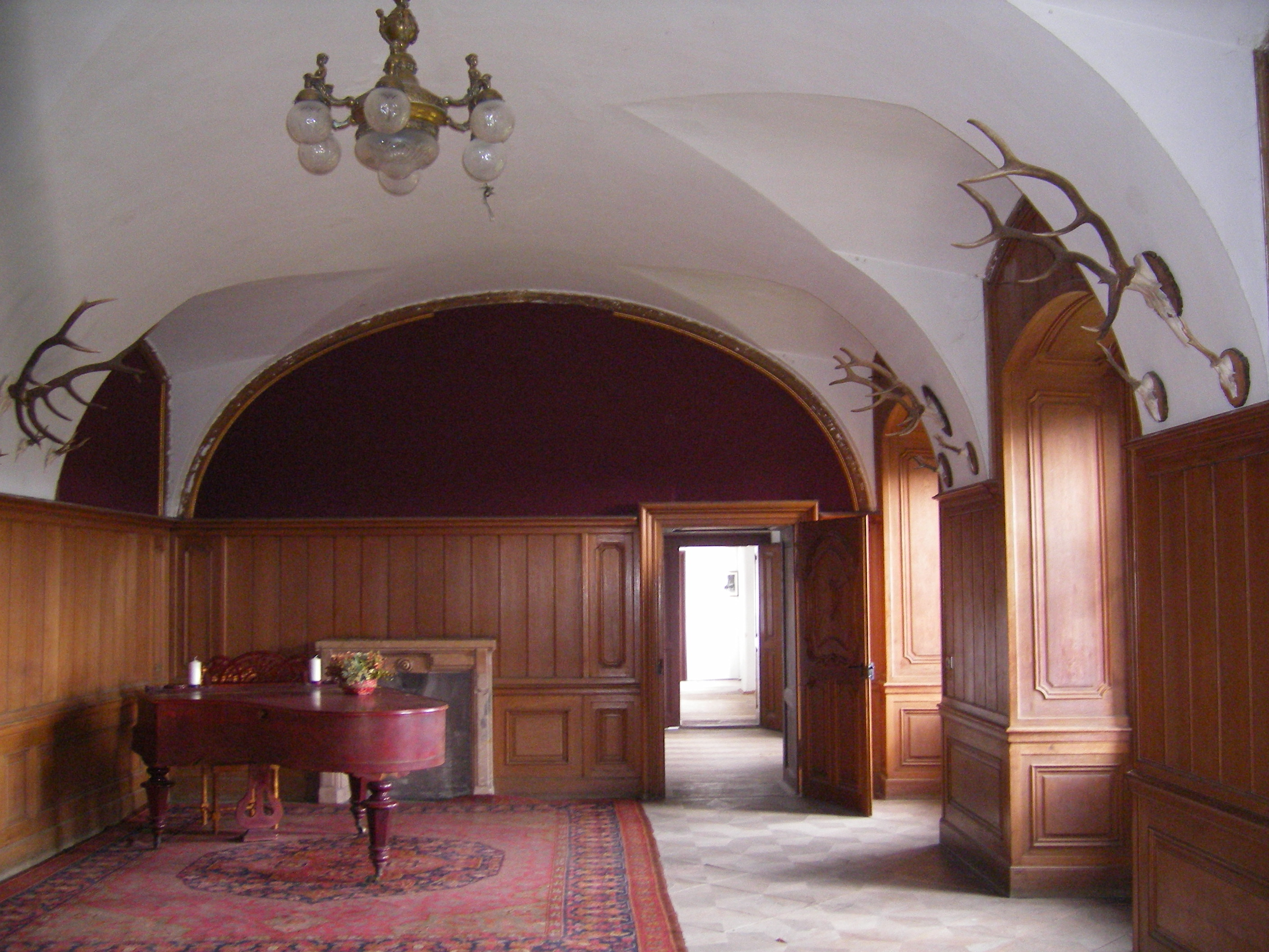 Oroszlány - majkpusztai kamalduli apátság